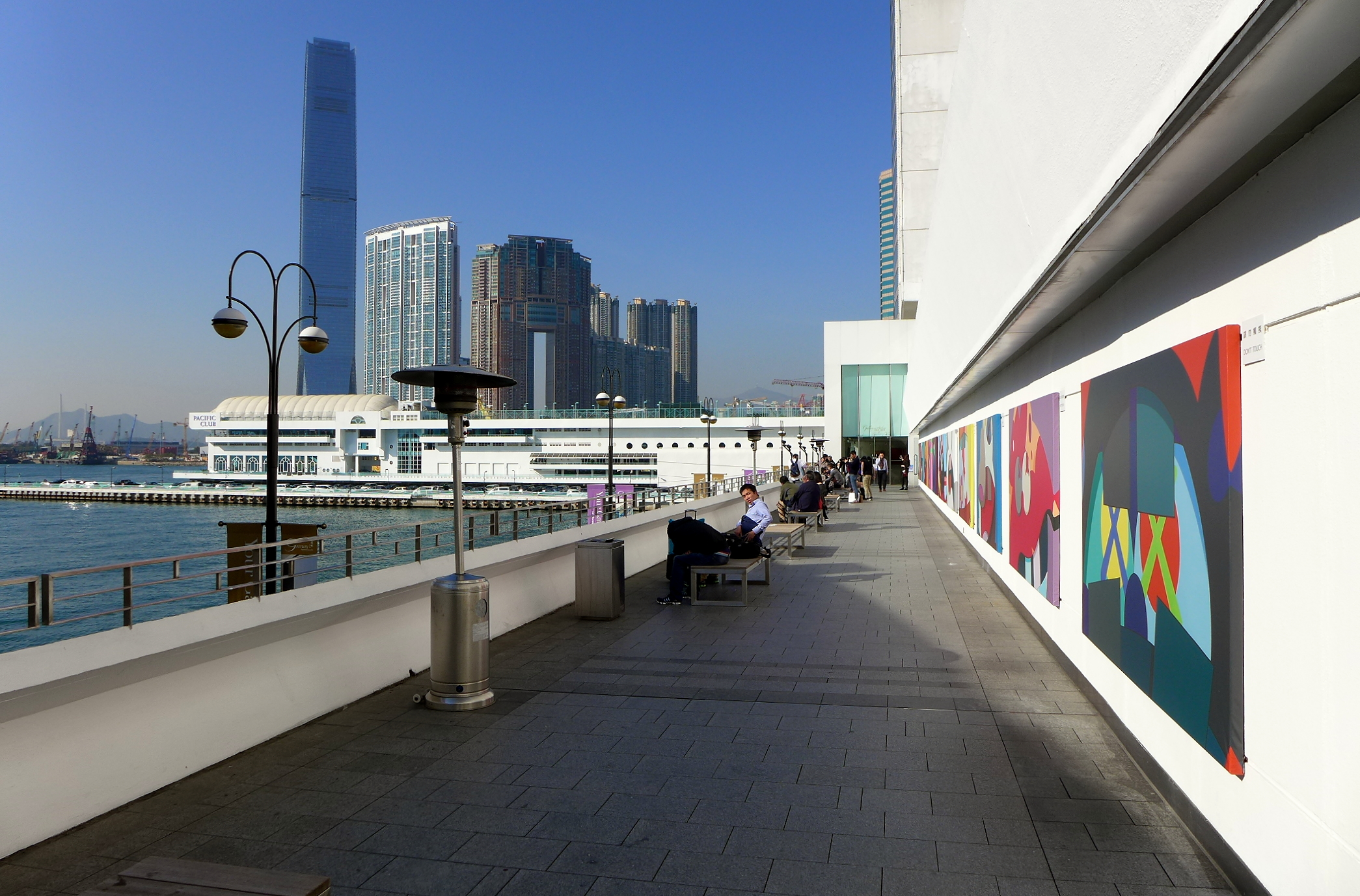 Ocean Centre Level 2 Outside Podium